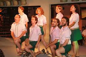 מקהלת גבעול